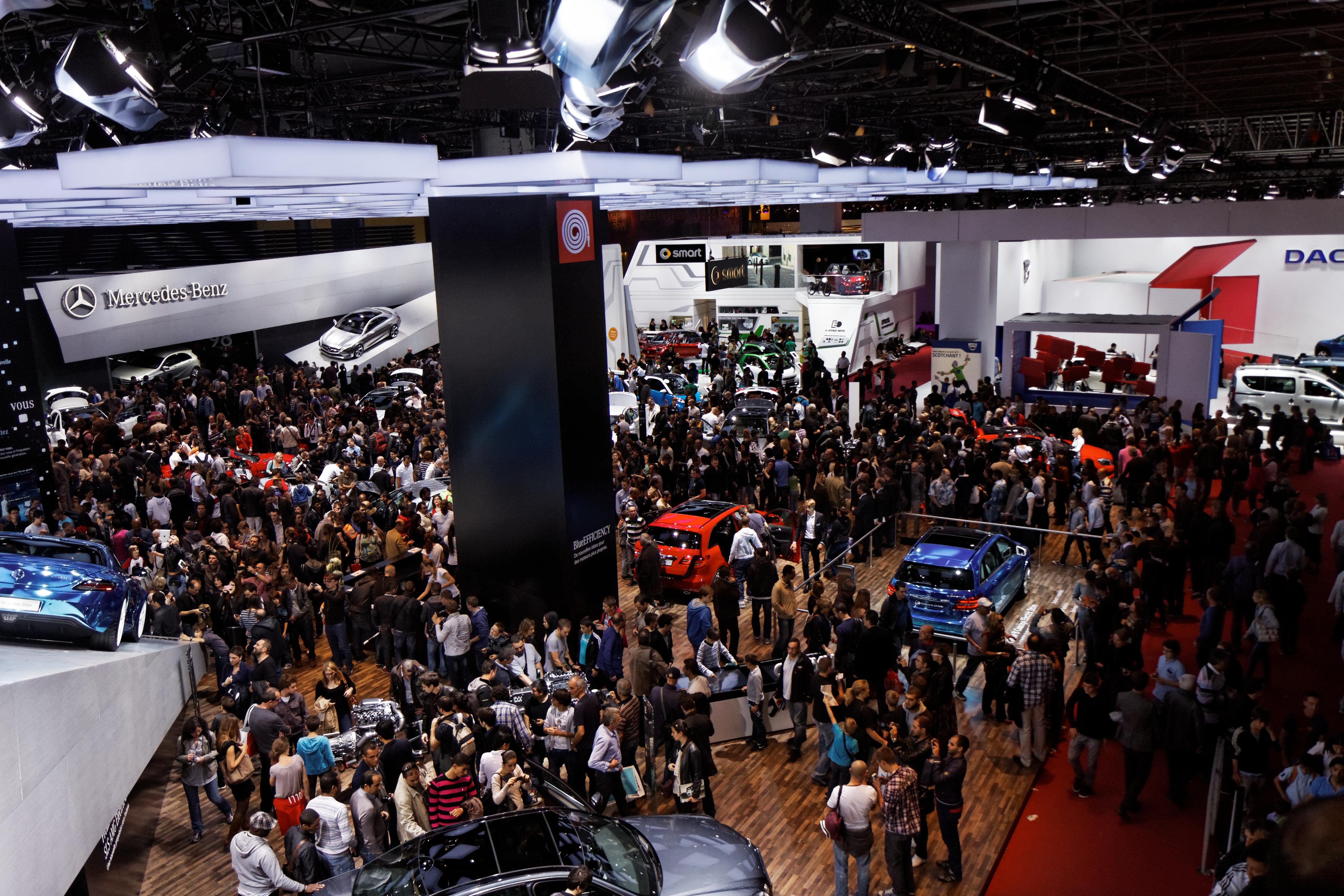 Vue du Mondial de l'automobile de Paris 2012.